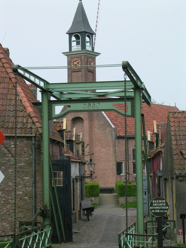 De kerk en brug van het Zuiderzeemuseum, Enkhuizen. The church en bridge of the Zuiderzeemuseum, Enkhuizen.